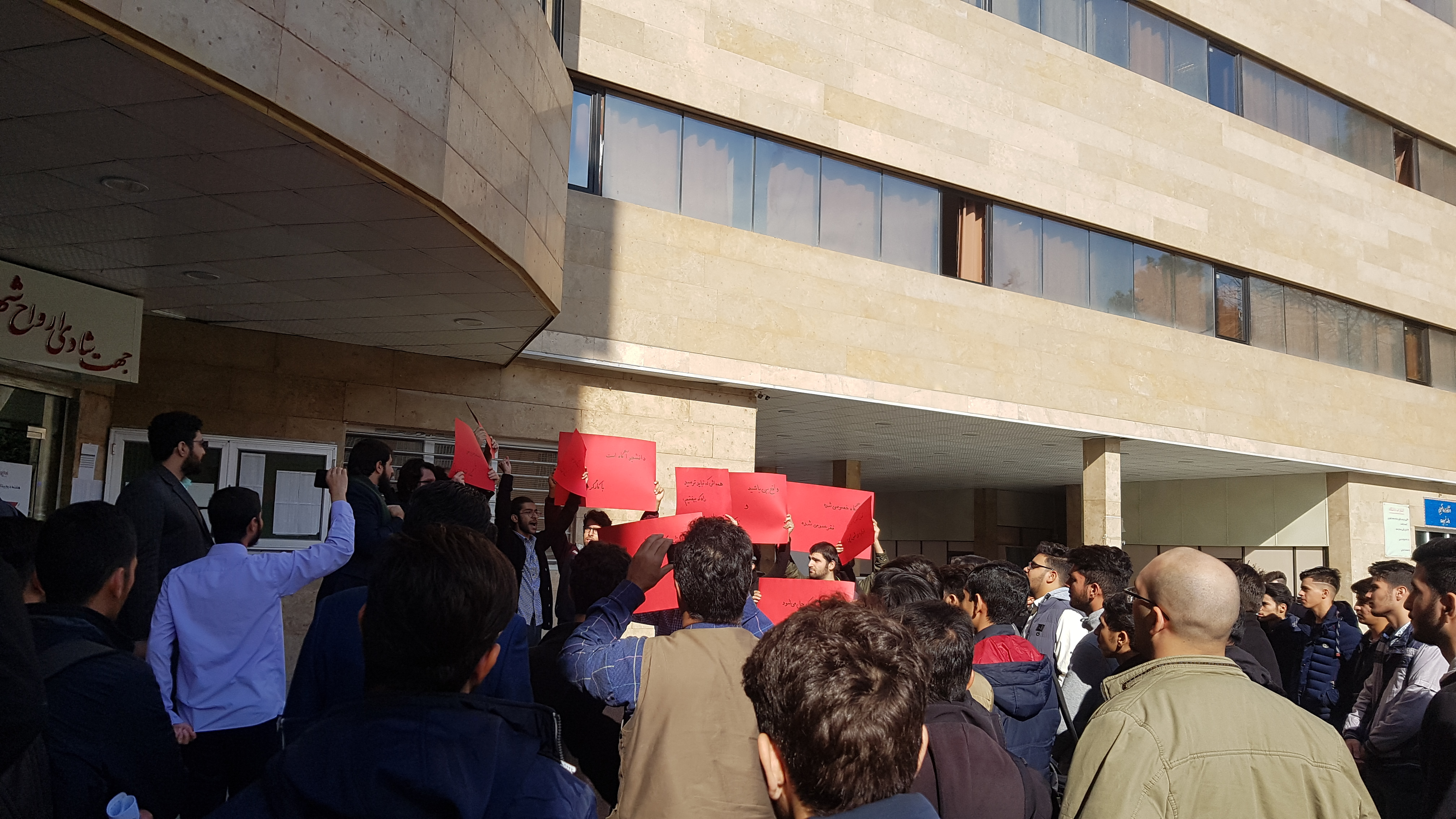 تجمع دانشجویان دانشکده فنی شمسی‌پور به مناسبت روز دانشجو و در همبستگی با کارگران و معلمان هفدهم آذرماه ۱۳۹۷ روبروی ساختمان جدید دانشکده فنی شمسی‌پور تهران